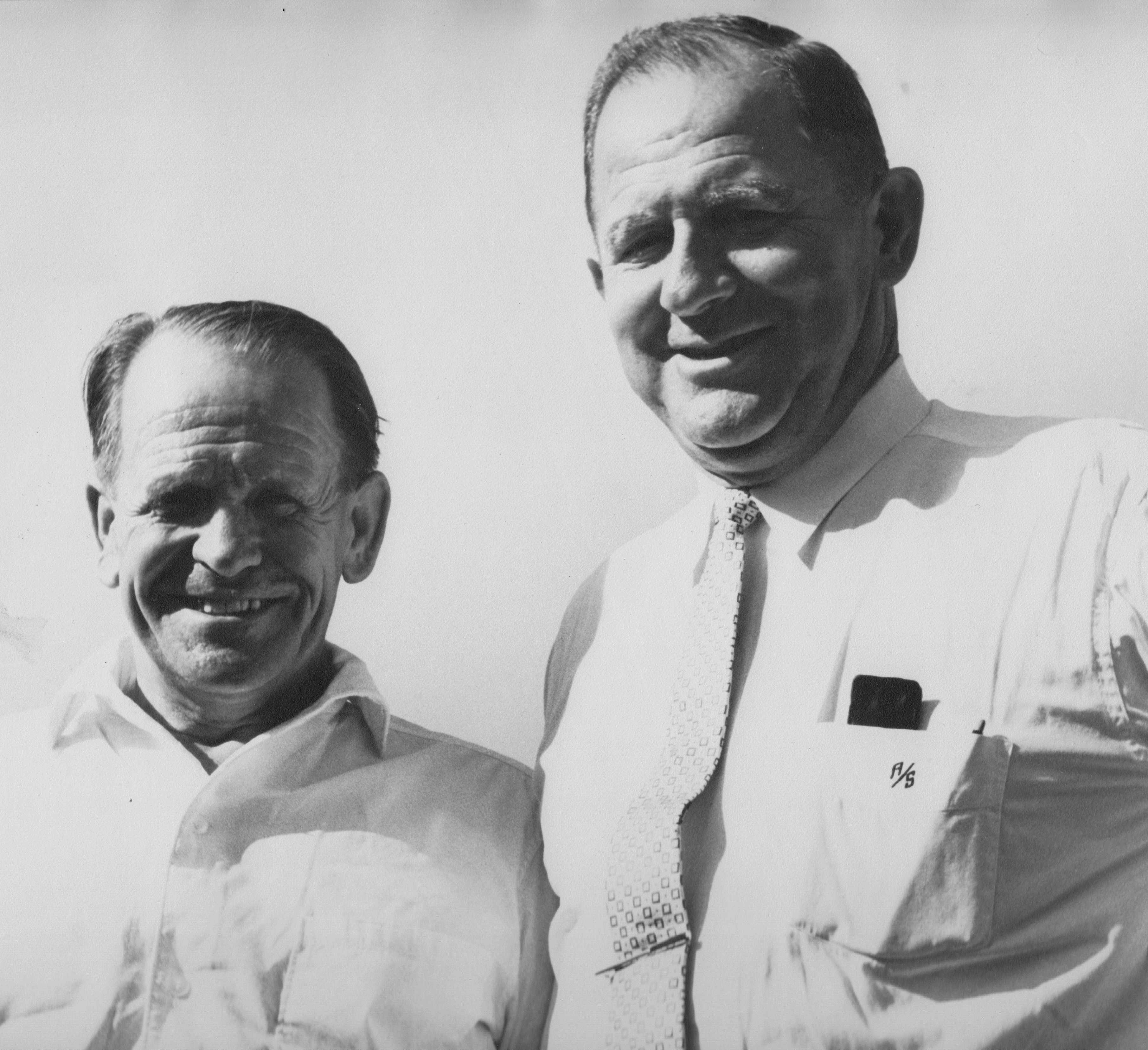 Der deutsche Fußball-Bundestrainer Sepp Herberger und August Steuer, etwa 1960, Fotograf unbekannt